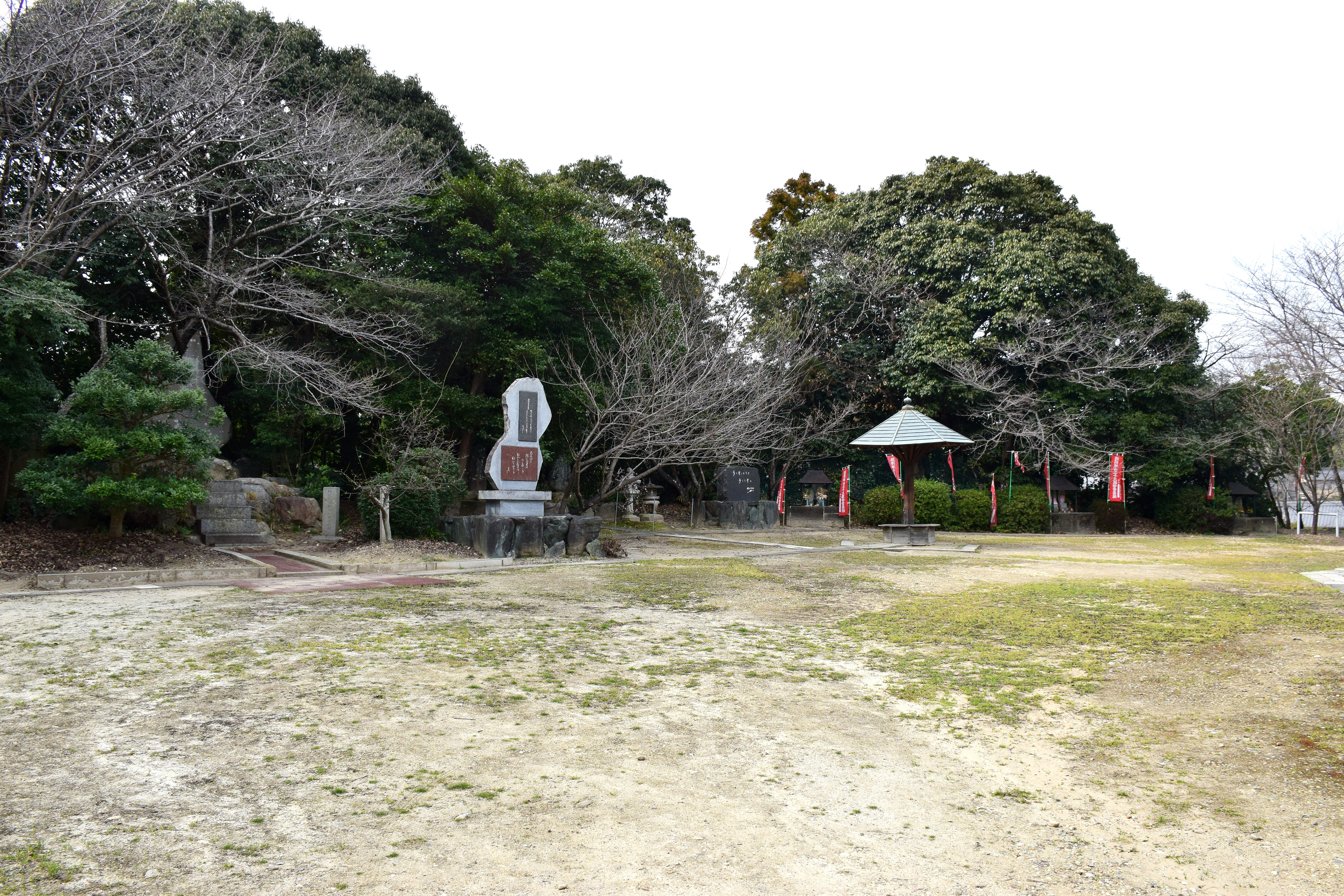 久松氏の居城であった坂部城址